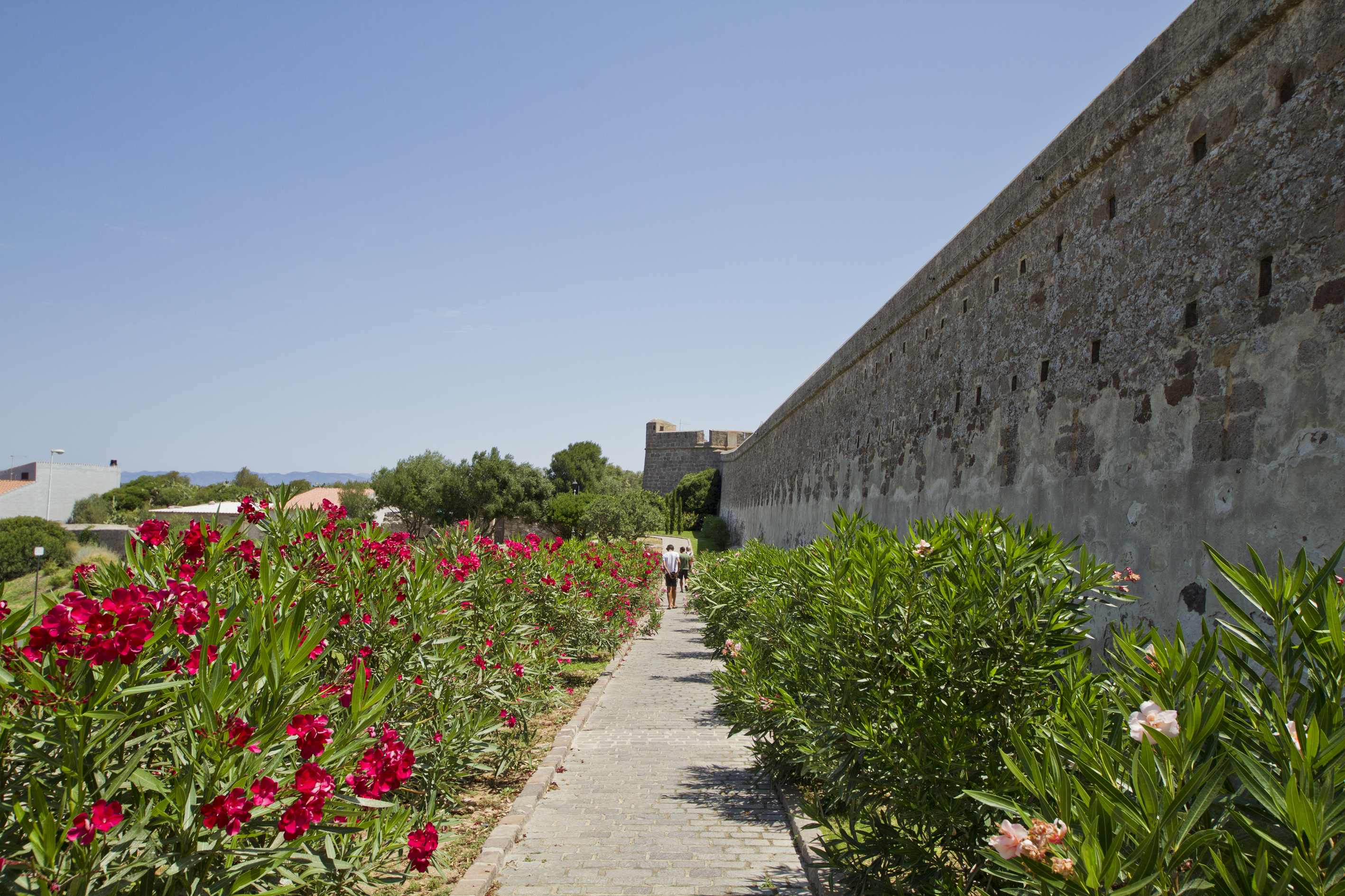 La Mura Carloforte, Isola di San Pietro, Carbonia-Iglesias, Sardinia, Italy